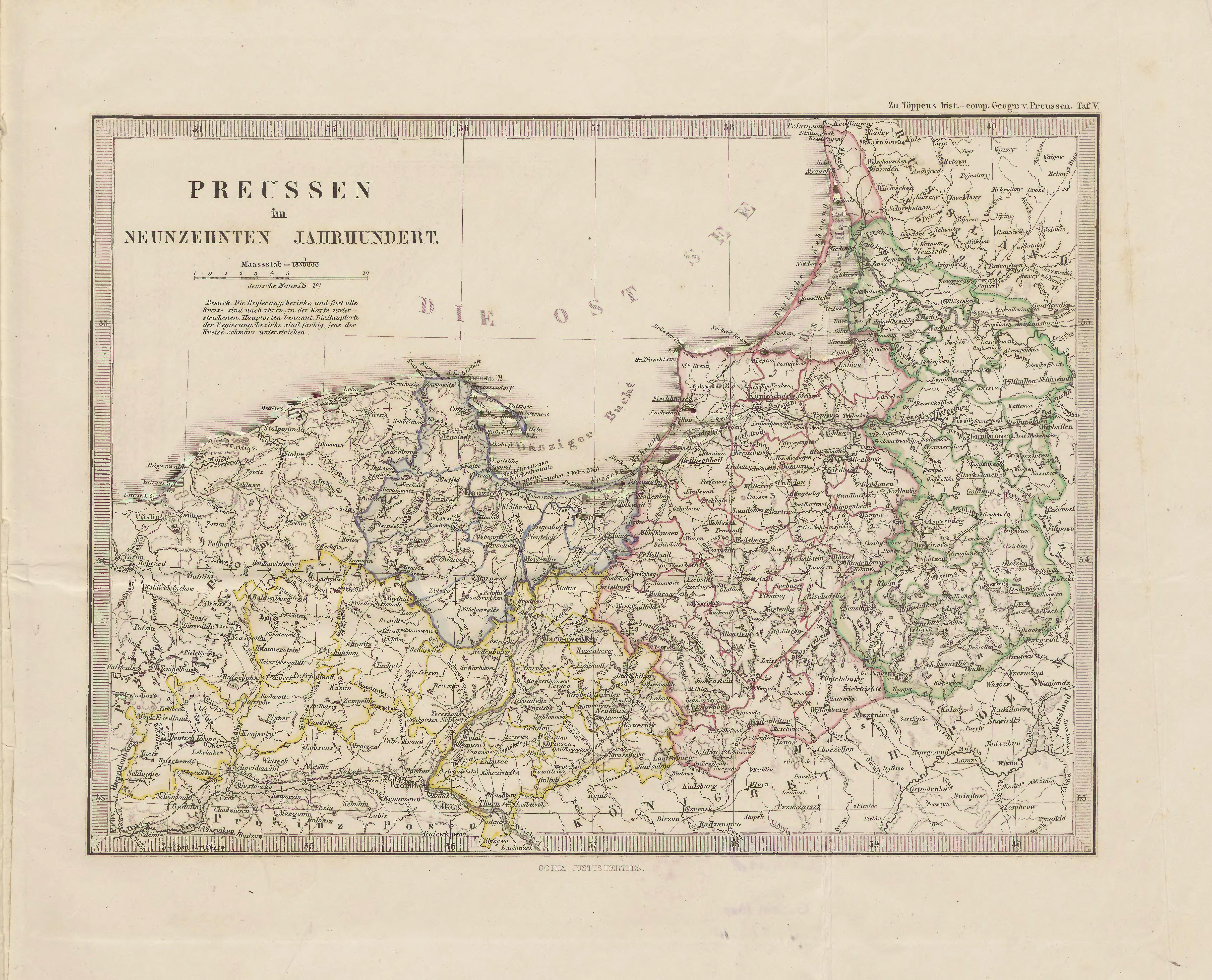 Karte: Preußen (Westpreußen und Ostpreußen) im 19. Jahrhundert (1818 – 1905)